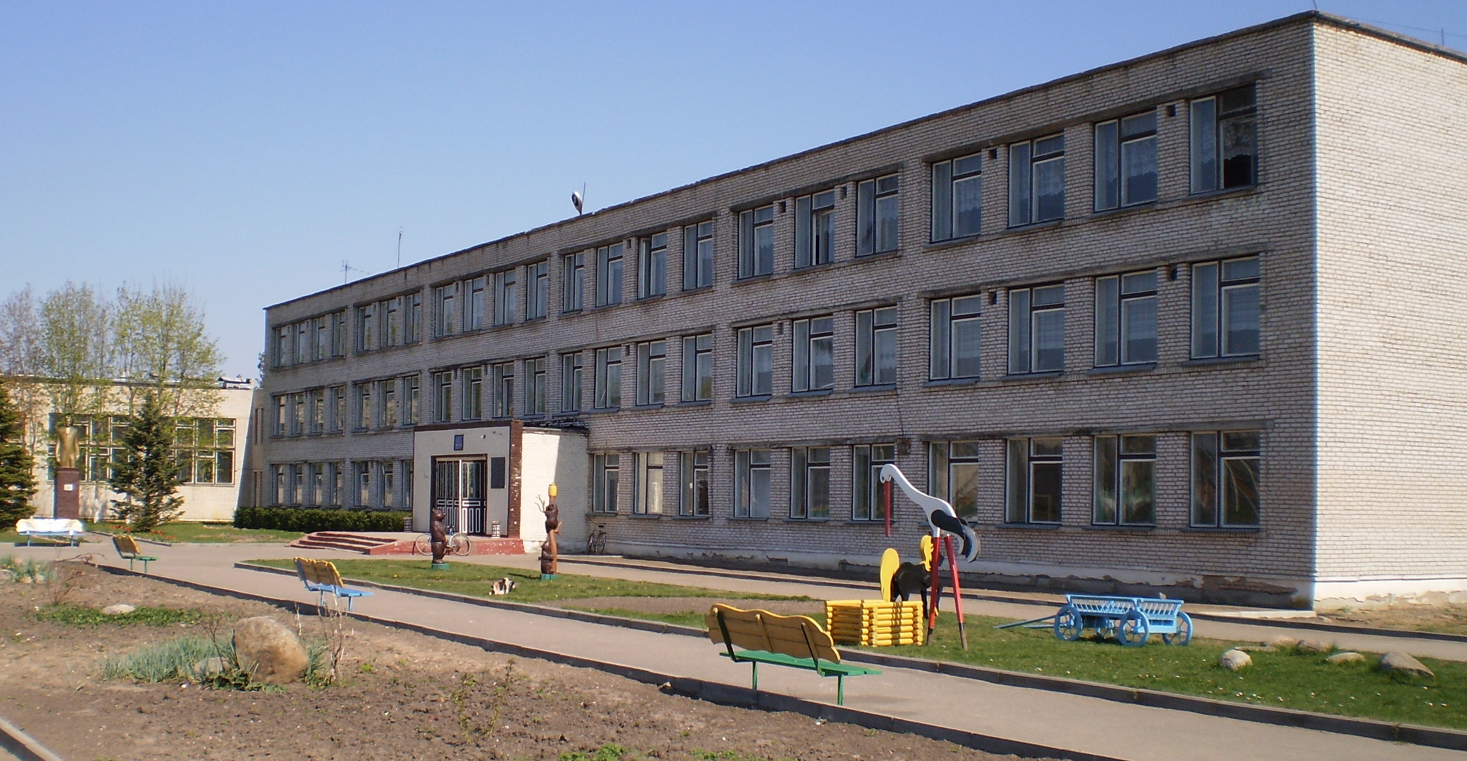 Бегомльская средняя общеобразовательная школа